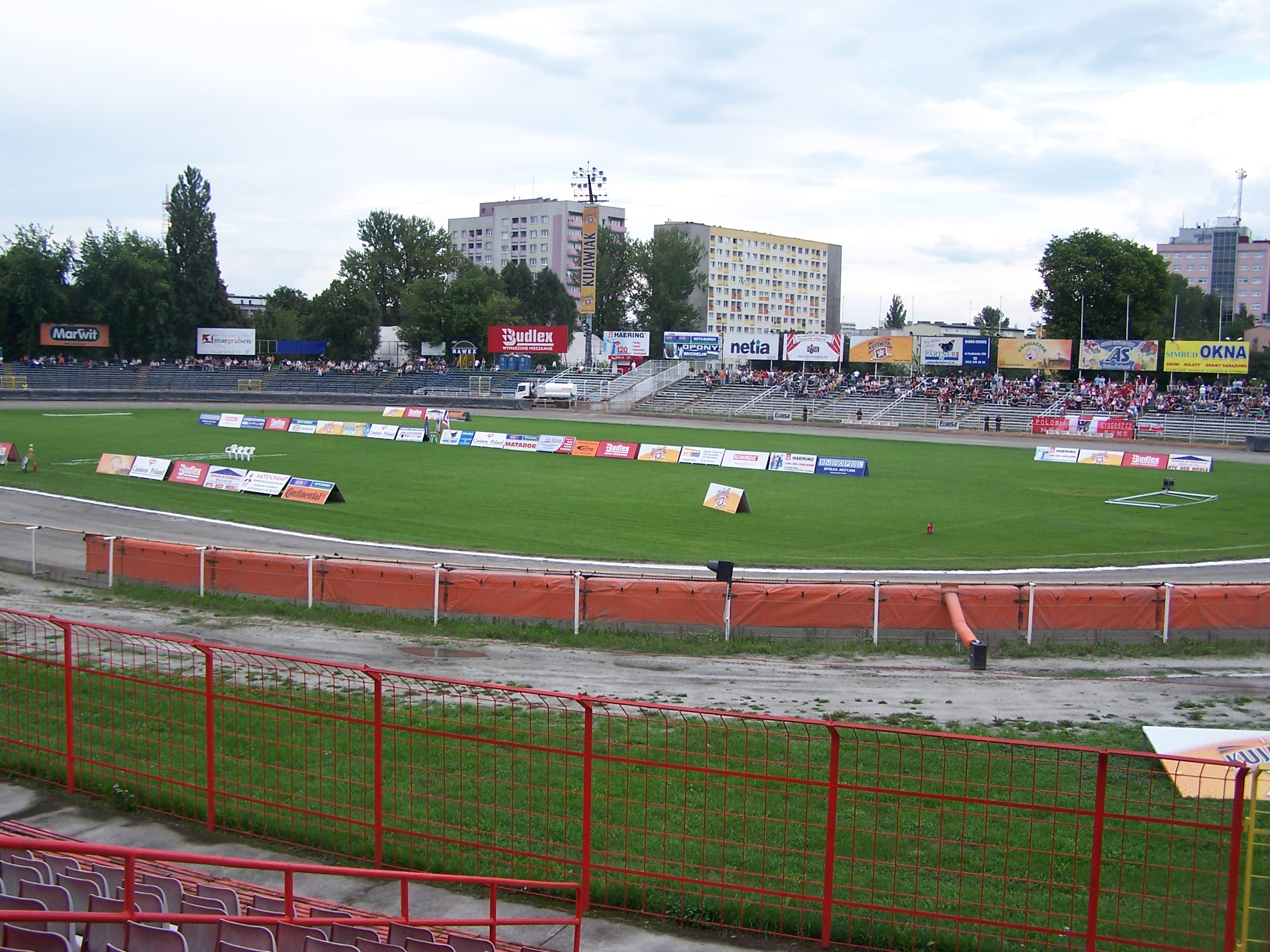 Stadion Polonii Bydgoszc (en: Polonia Stadium)